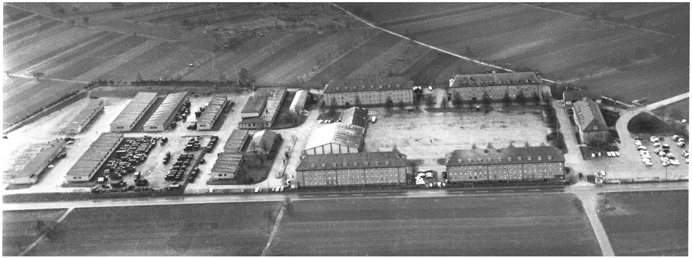 Kaserne an der Binswanger Straße in Neckarsulm (um 1960), gebaut 1935/1936, hier waren stationiert: 14. Panzerabwehr-Kompanie des Infanterie-Regimentes 119 (ab 1936) und die 4. und 5. Batterie der II. motorisierten Abteilung des Artillerie-Regimentes 71 (ab 1937)